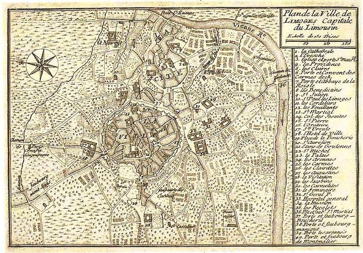 Plan de la ville de Limoges (87) réalisé par Cornuau en 1765